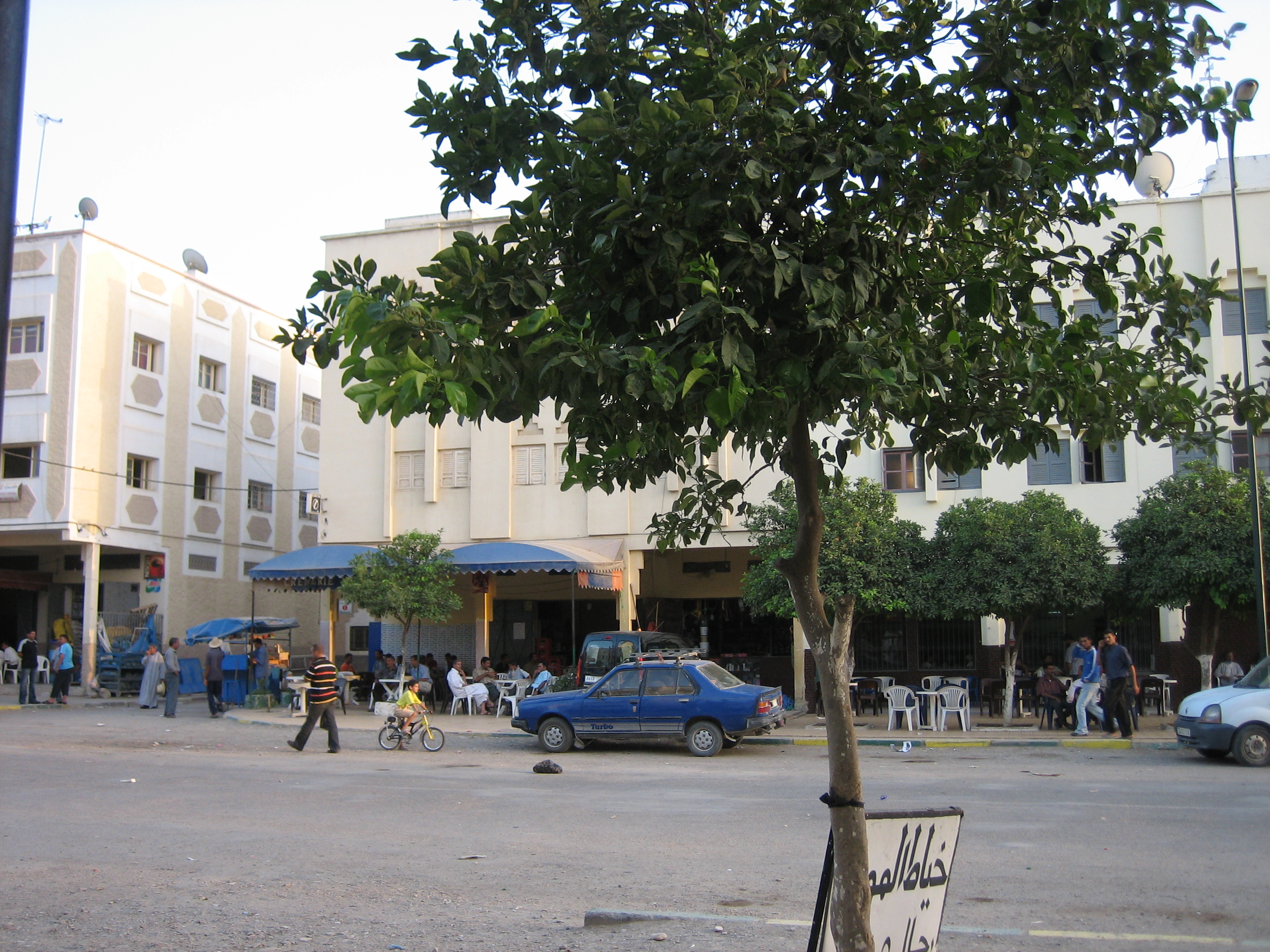 Centre ville de Tissa